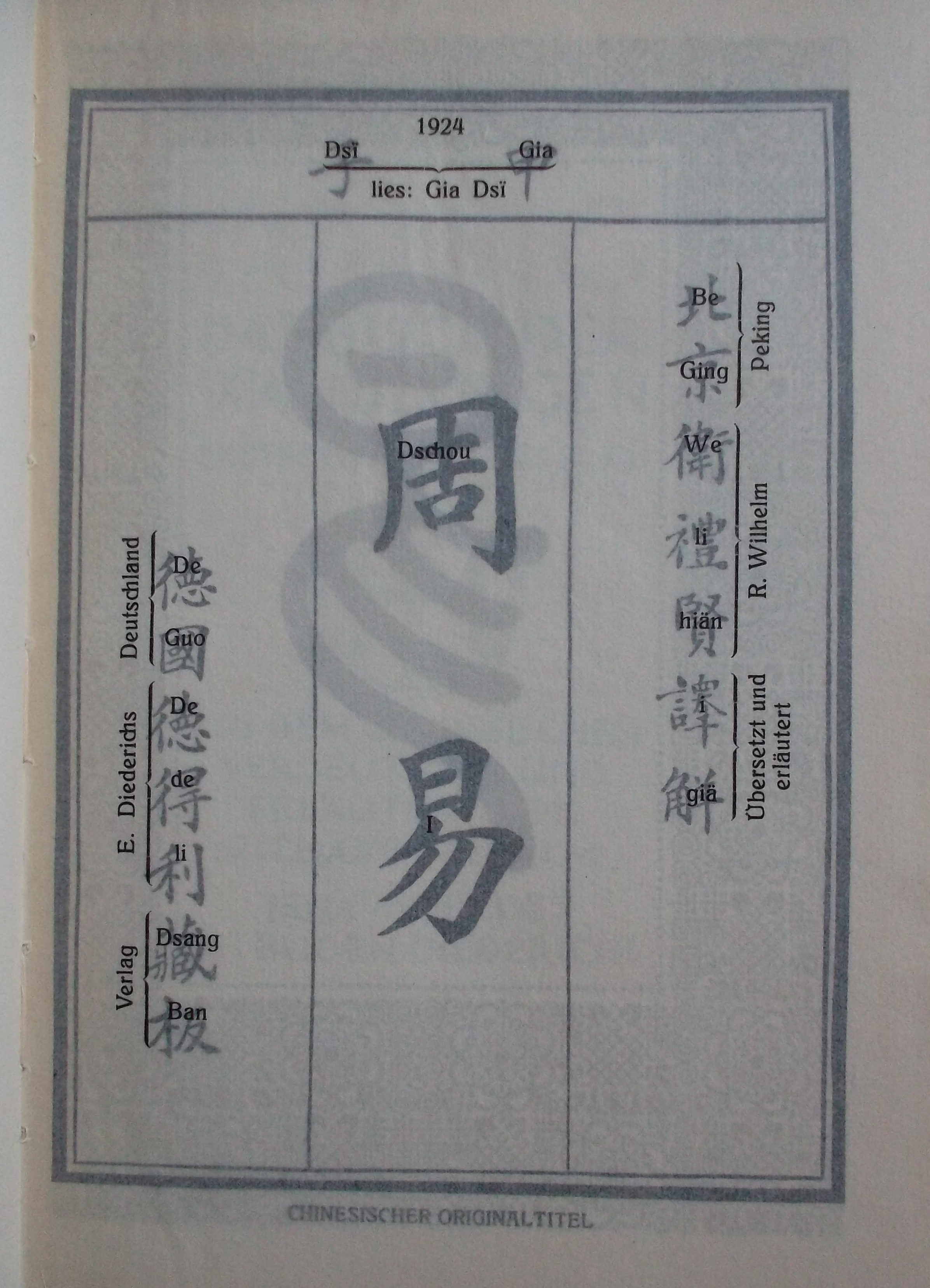 Frontispiz der Erstausgabe des I Ging, übersetzt und erläutert von Richard Wilhelm, Verlag E. Diederichs, 1924 (incl. eingebundenem durchsichtigen Blatt mit der Übersetzung)